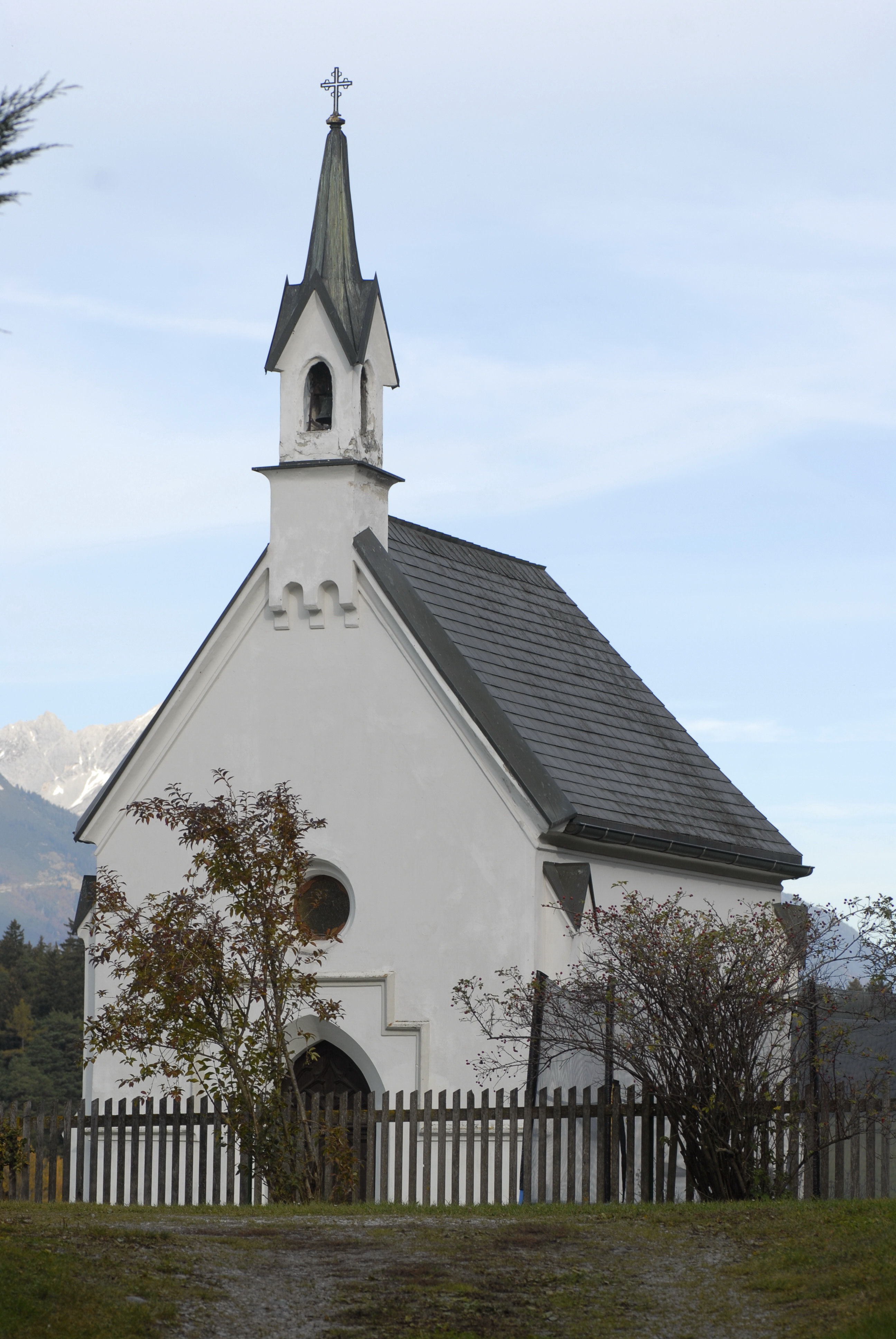 Aldrans, Hofkapelle, Brandlhof, Rinner Straße 5